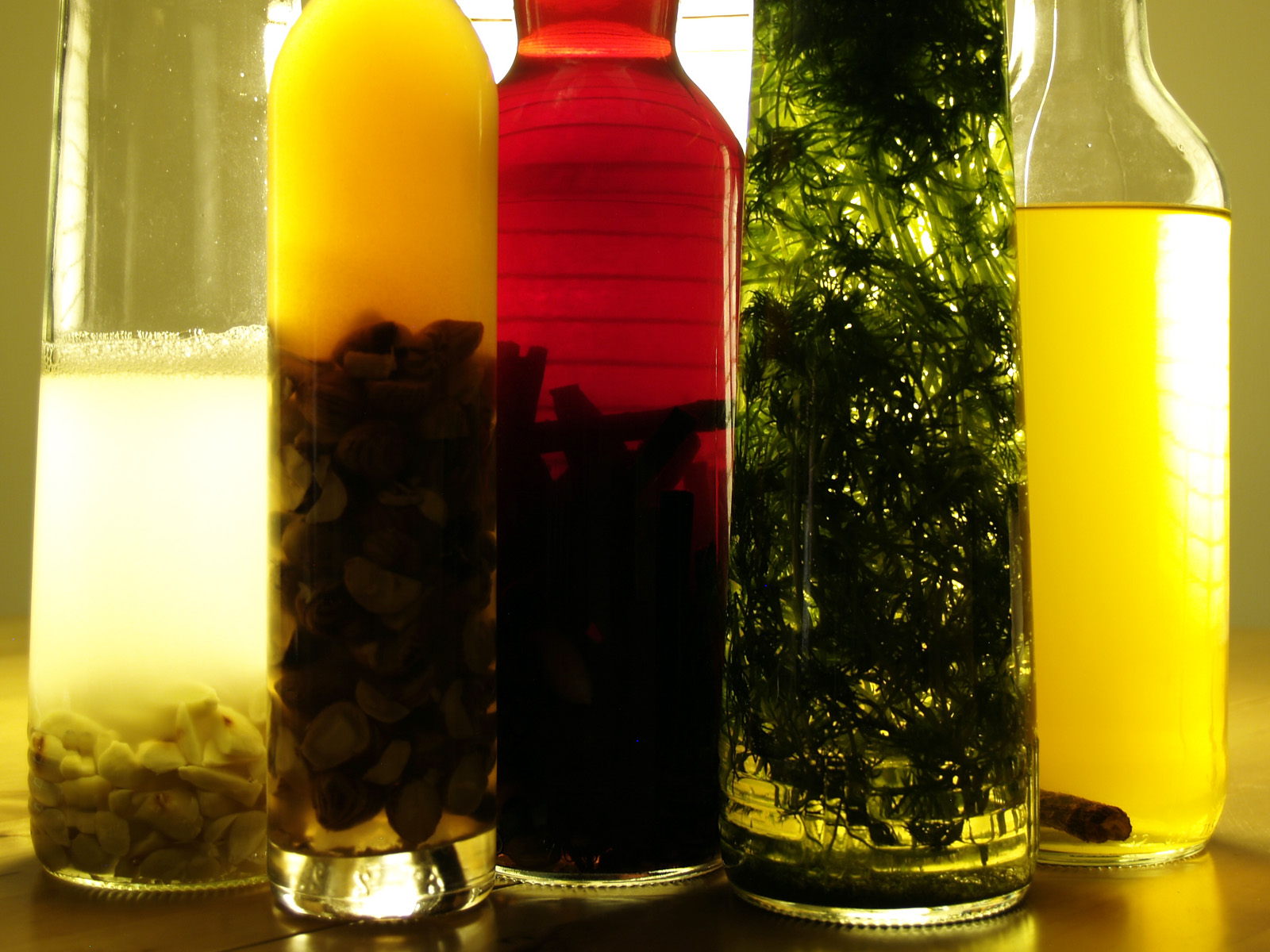 Mandelsnaps, snaps med hasselnødder, julesnaps, dildakvavit og lakridssnaps